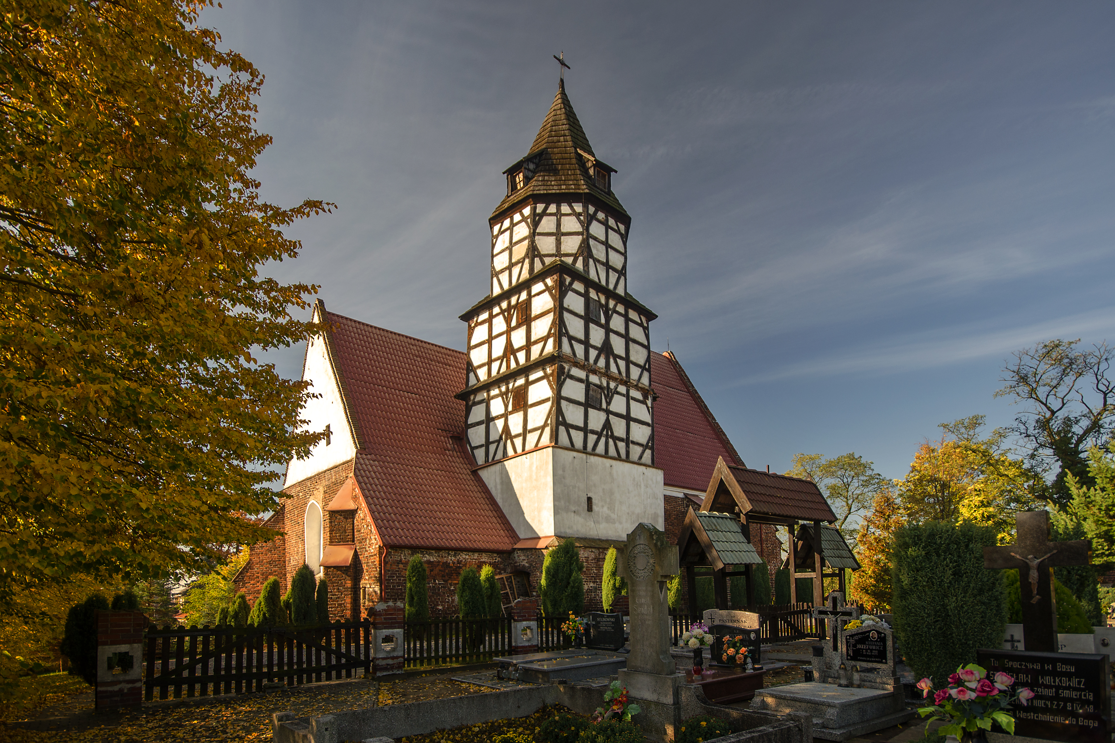 Kościerzyce, kościół fil. p.w. Wniebowzięcia NMP (d. p.w. św. Jerzego), XIV/XV (korpus), XVII (wieża)